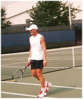 self made photo